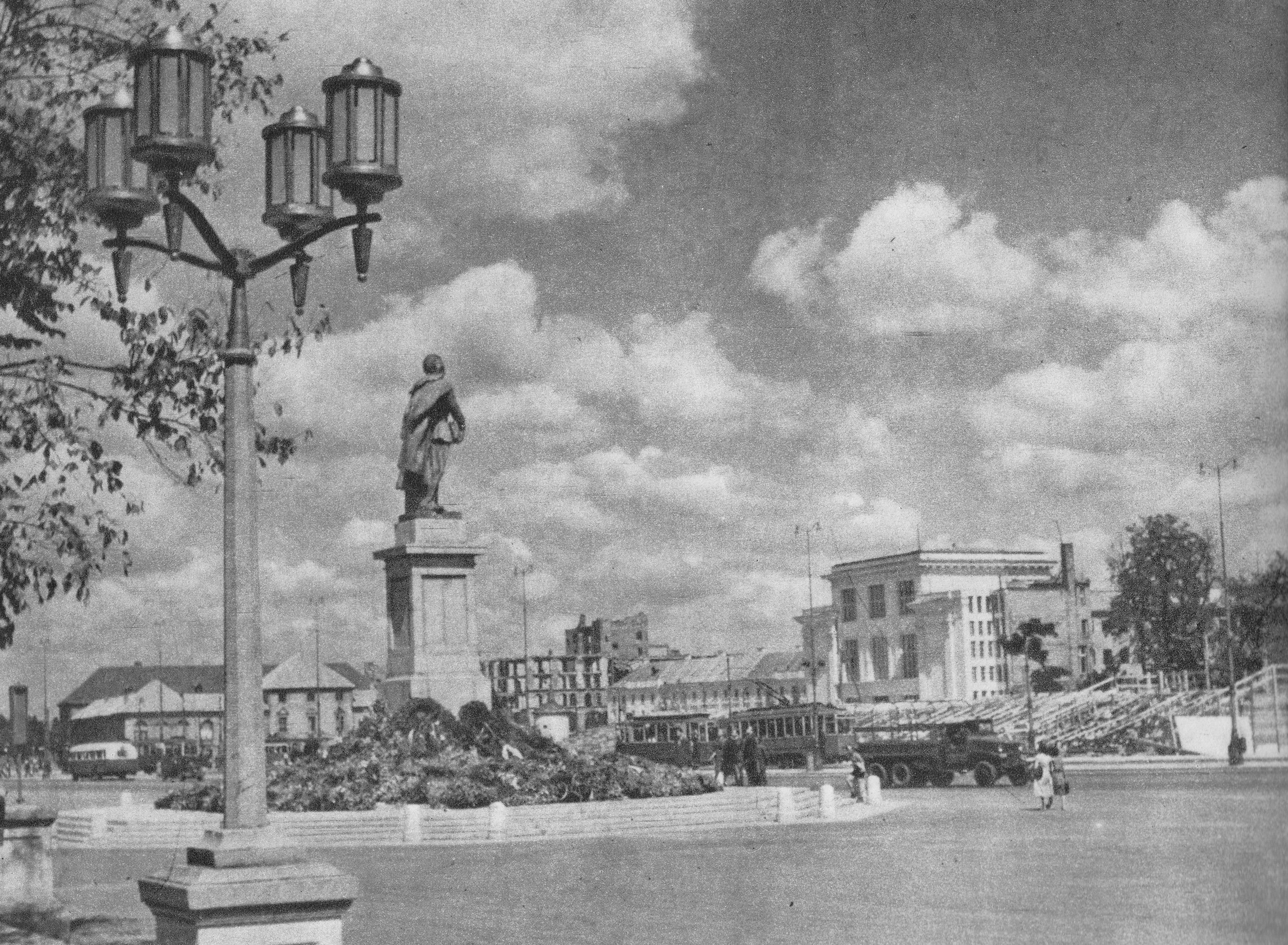 Plac Bankowy (Feliksa Dzierżyńskiego) w Warszawie